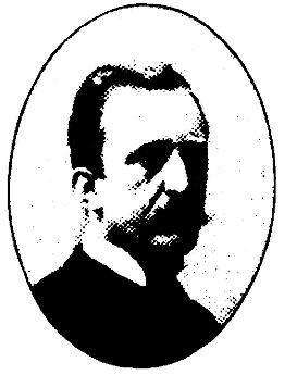 Aus Porträtgallerie der Astronomischen Gesellschaft [1]